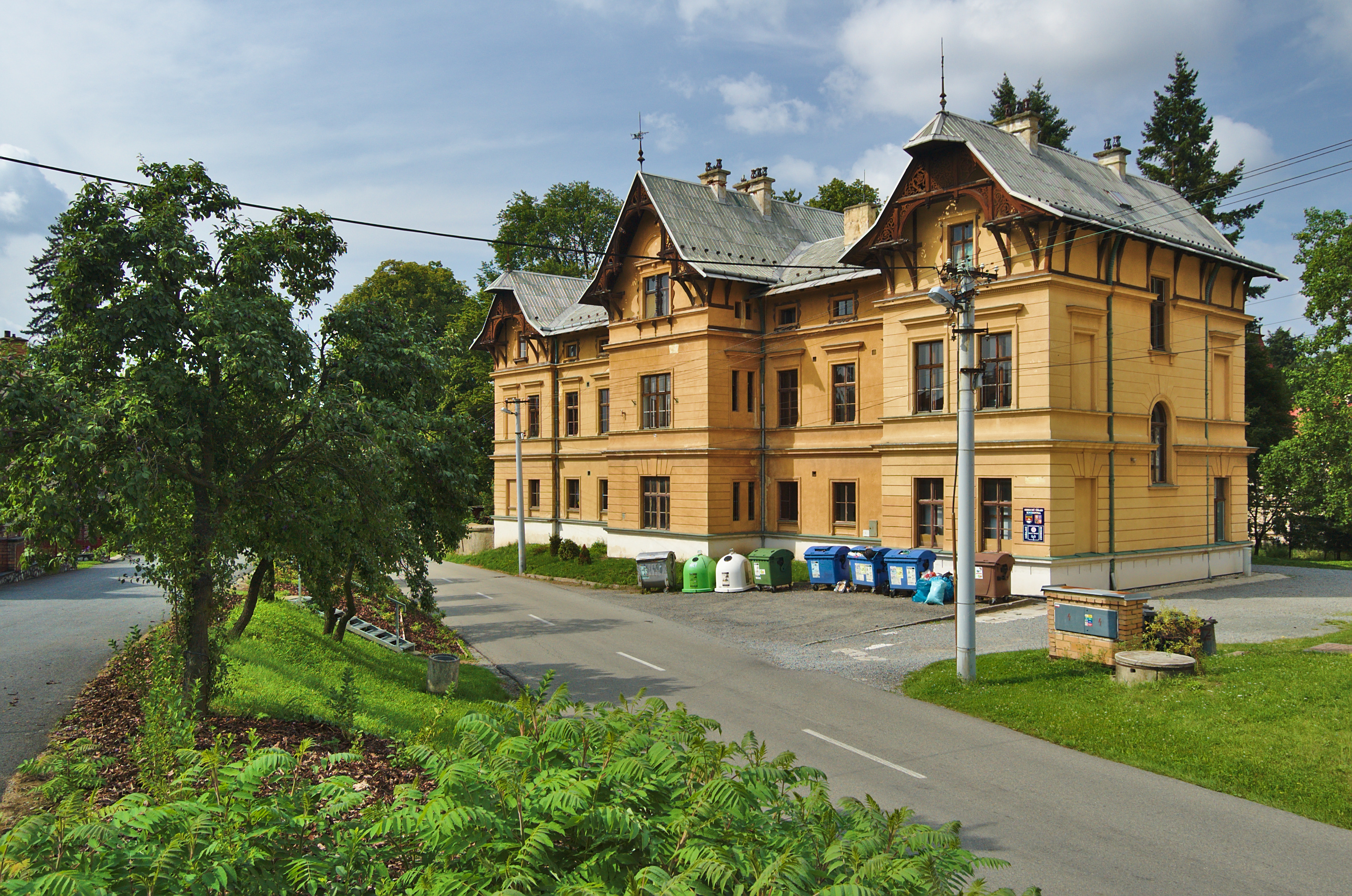 Obecní úřad, Šebetov, okres Blansko